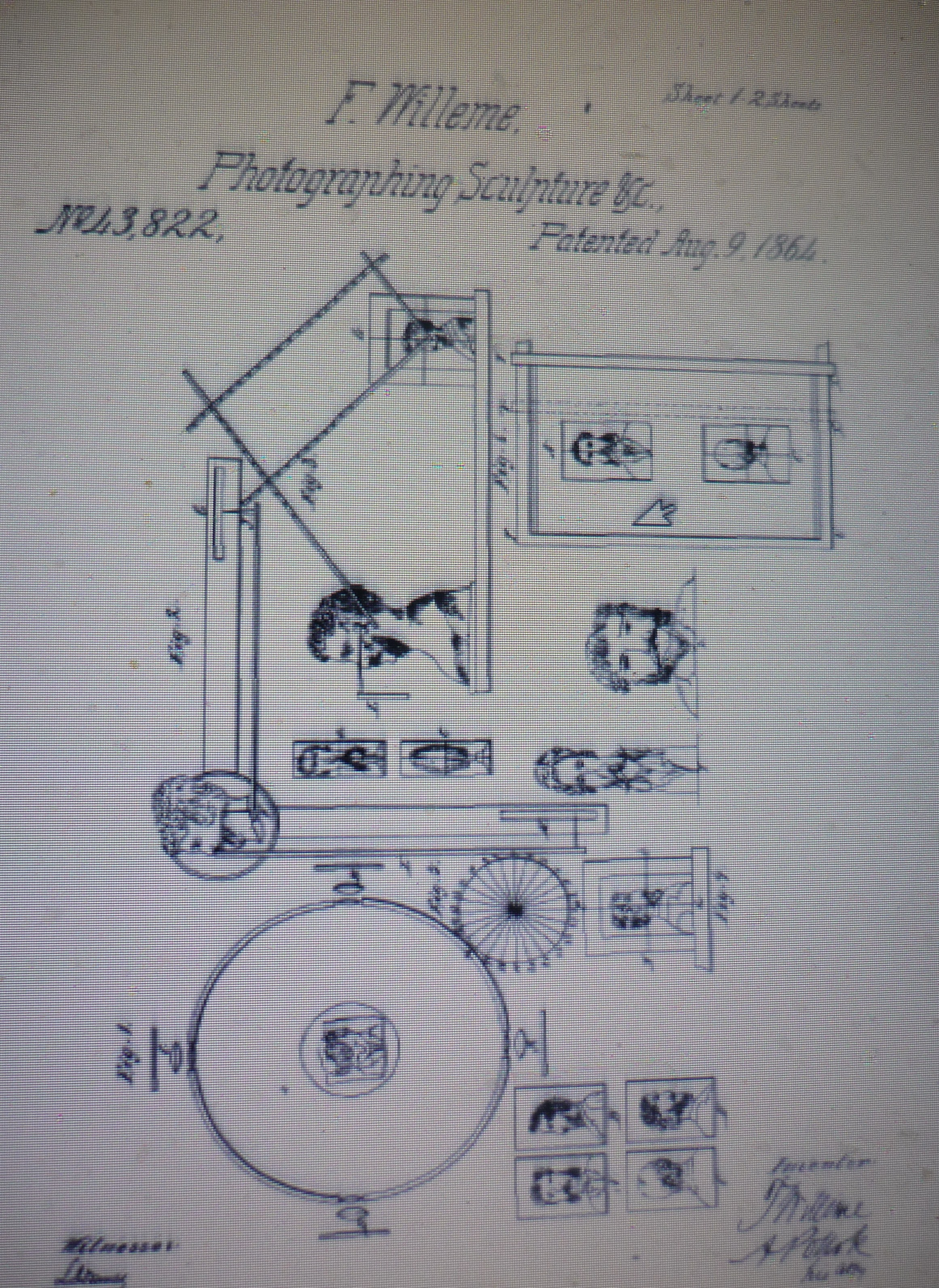 Brevet américain de la photosculpture.